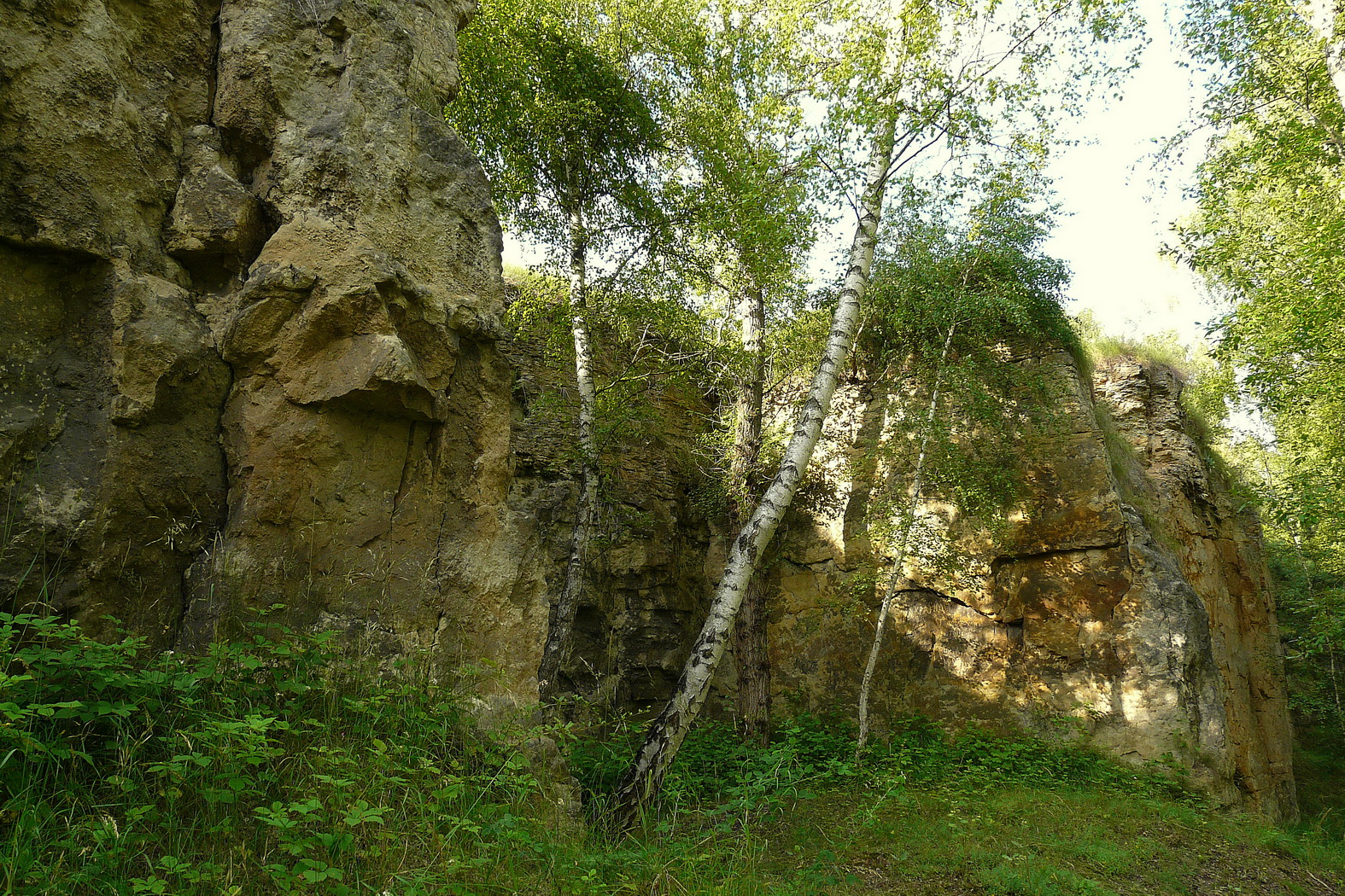 Lom u Chrástu